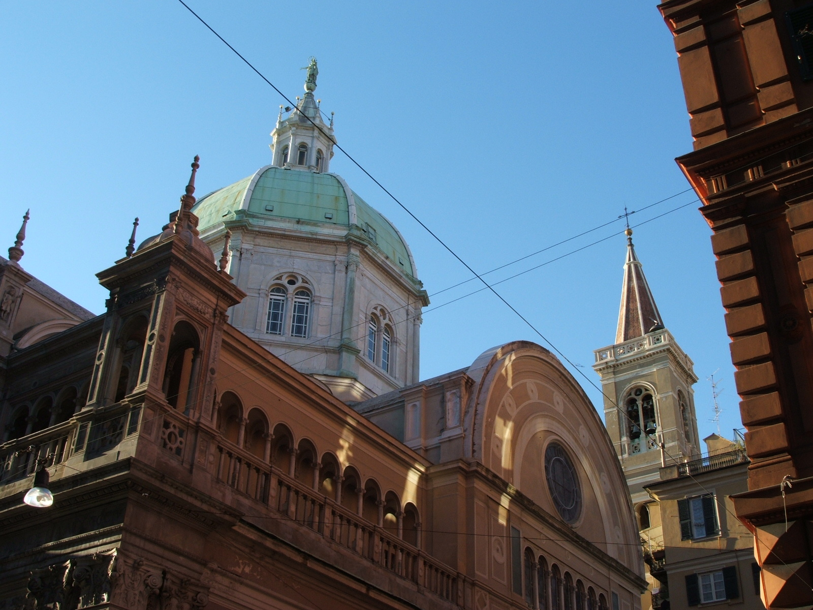 Immagine da Genova - Chiesa di Santa Maria Immacolata